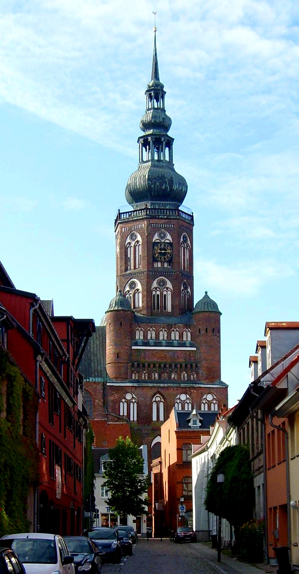 Der Turm des Doms St. Nikolai von Norden aus durch die Hunnenstraße gesehen